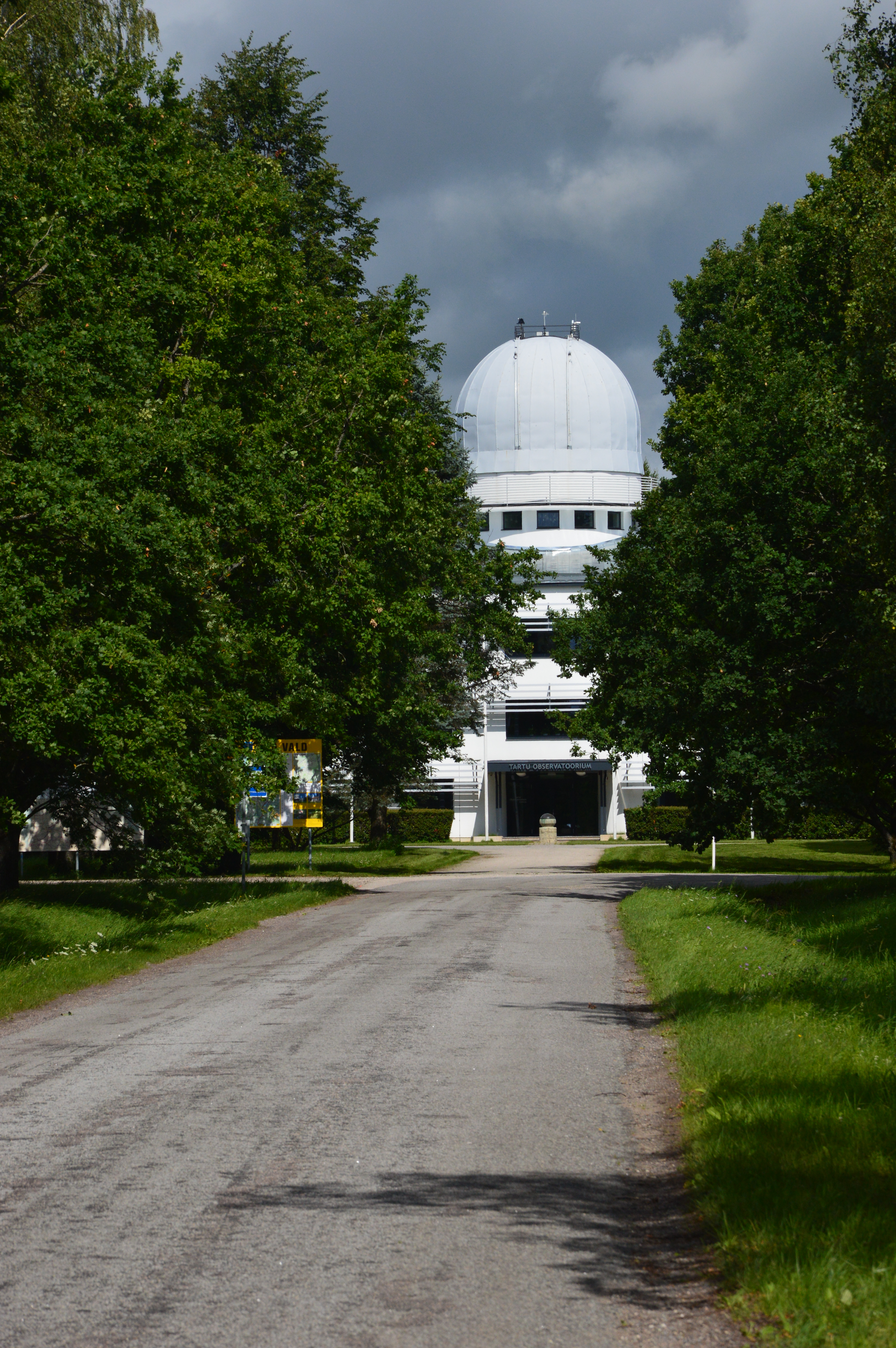 Tõravere observatoorium.